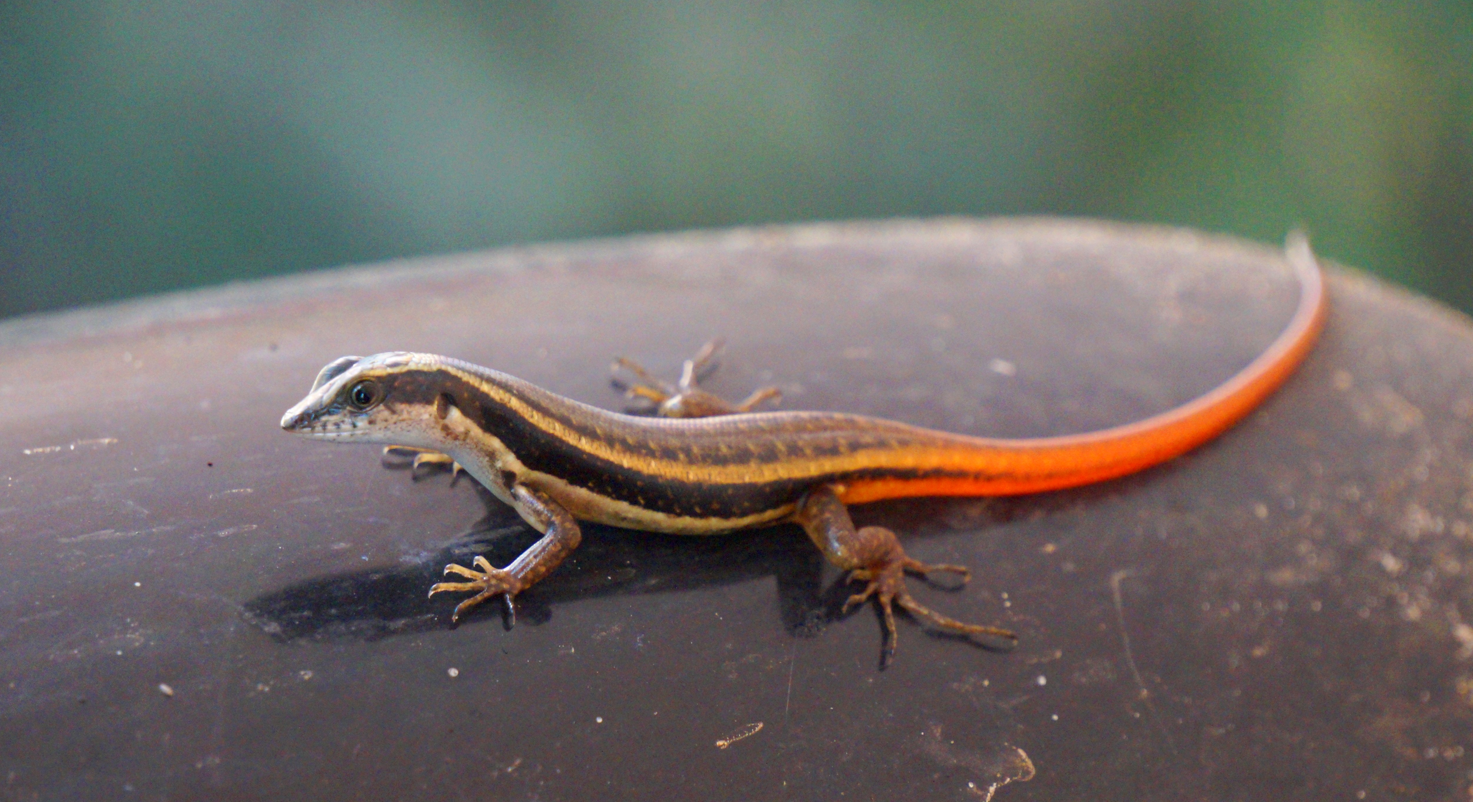 ചുവന്ന വാലന്‍ അരണ